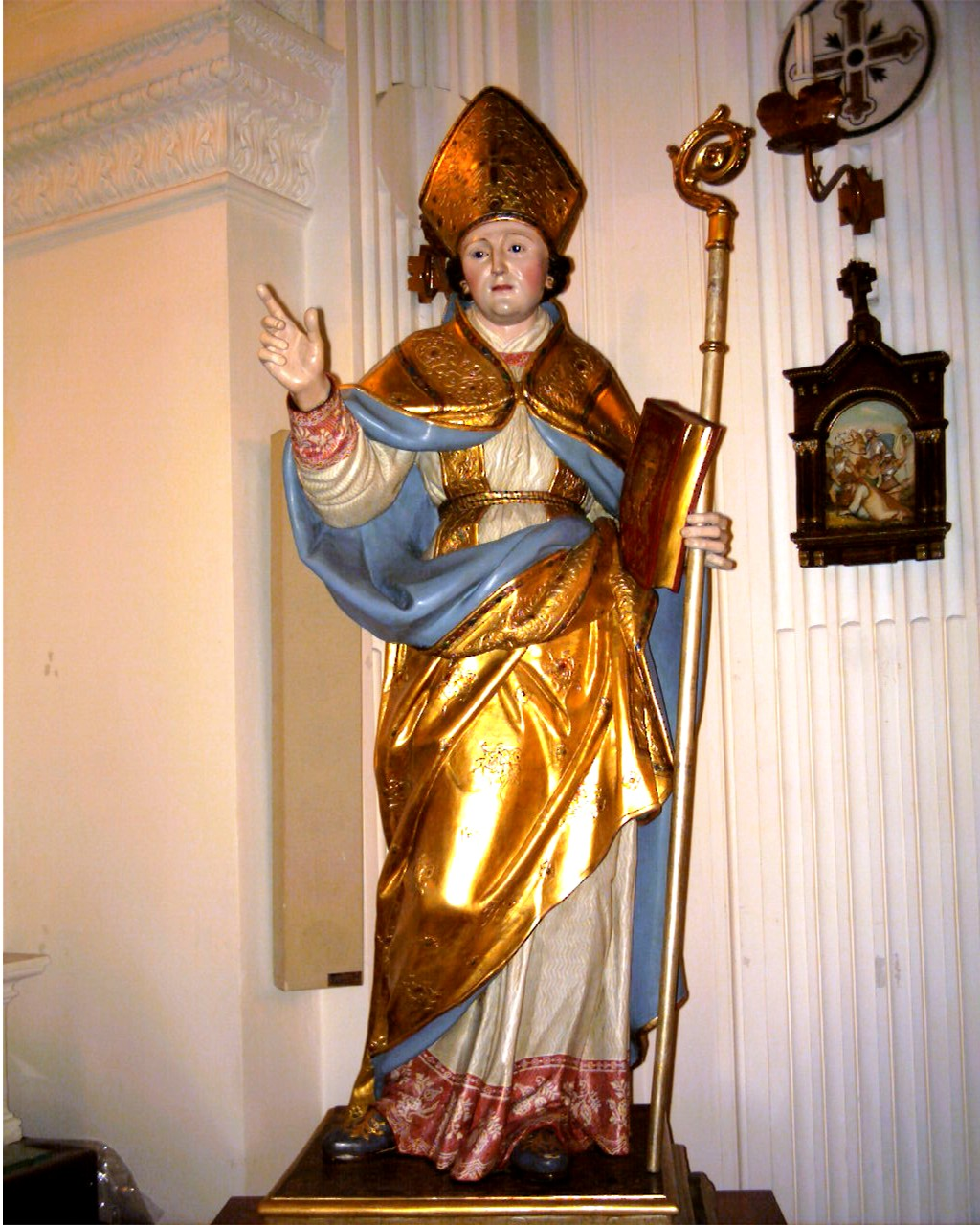 Statua lignea di San Mauro Abate venerata a San Mauro La Bruca